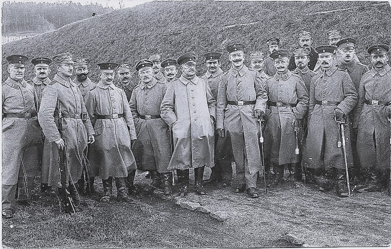 preussischer Landsturm Abteilung an der Ostfront